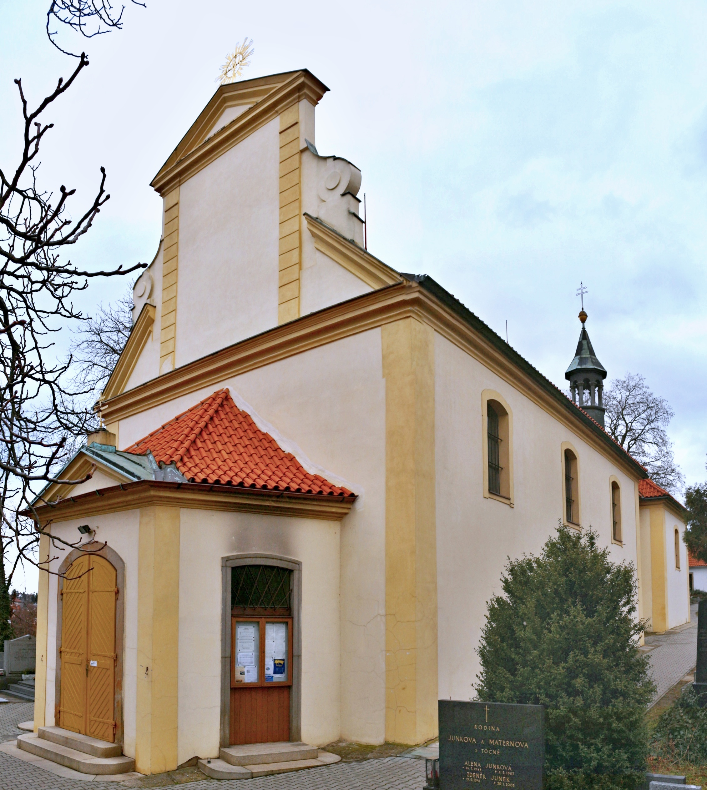 Kostel Narození Panny Marie v Modřanech